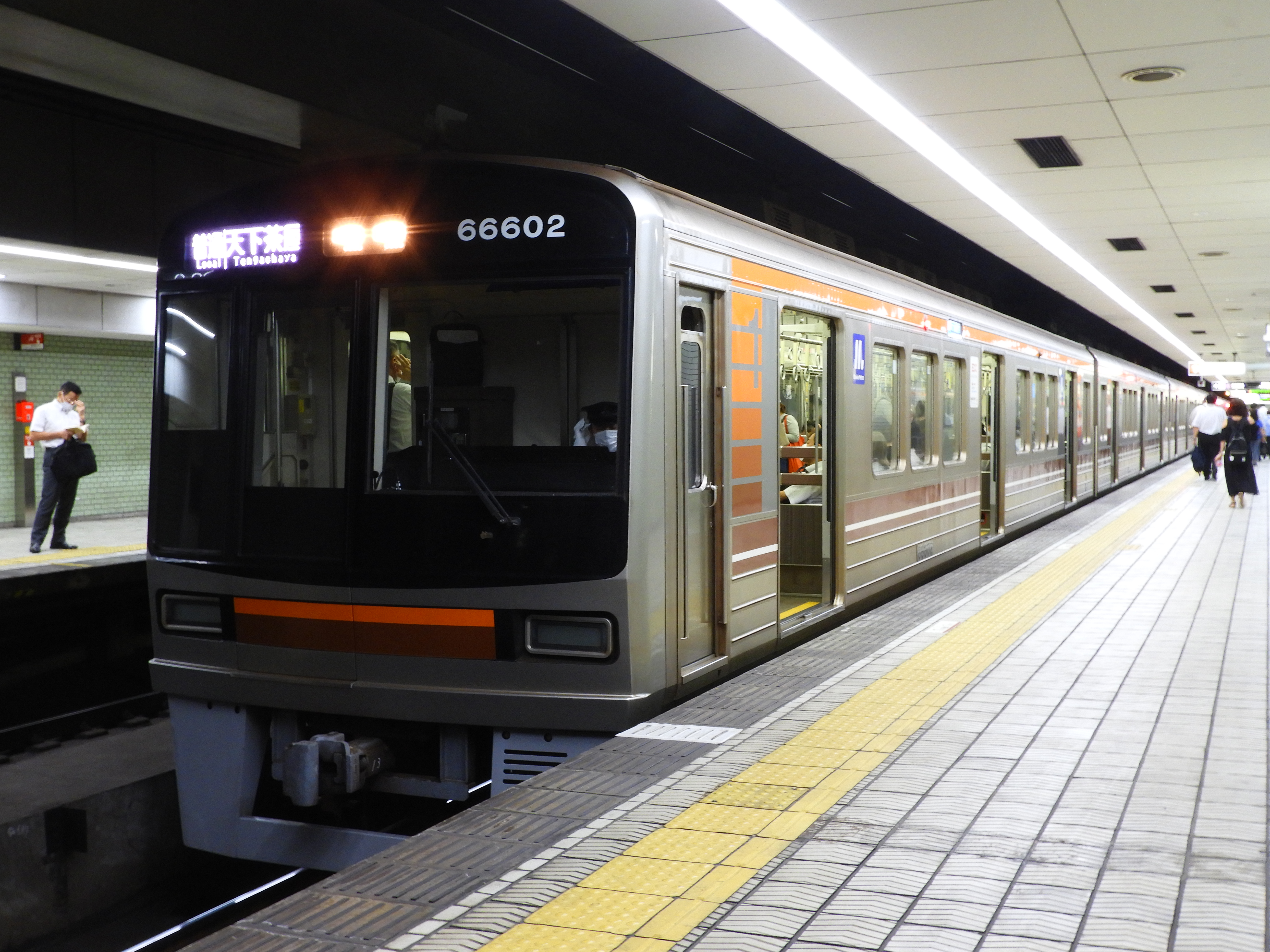 Osaka Metro66系66602F（リニューアル車、前照灯LED化済） 日本橋駅にて Nikon Coolpix B700